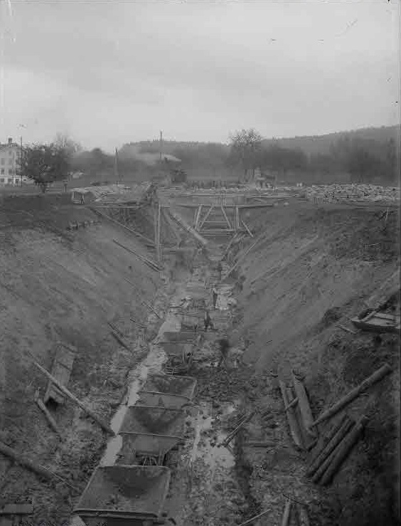 Bruggwaldtunnel; Blick auf das Gleisbett und Waggons zum Schuttabtransport